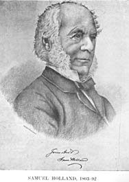 Samuel Holland As Meirionnydd